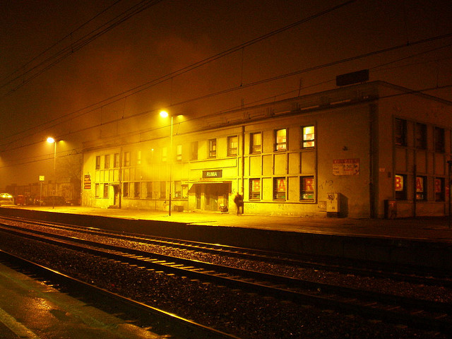 2008.12.01 - Rumia, Dworzec PKP